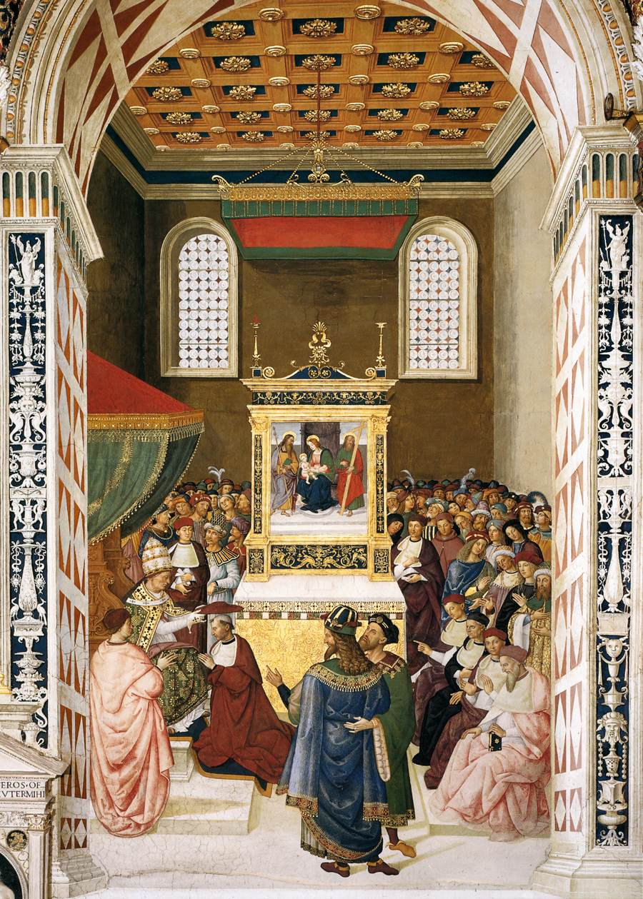 PINTURICCHIO Pope Callistus III promotes Enea Silvio Piccolomini to cardinal Fresco Piccolomini Library, Duomo, Siena